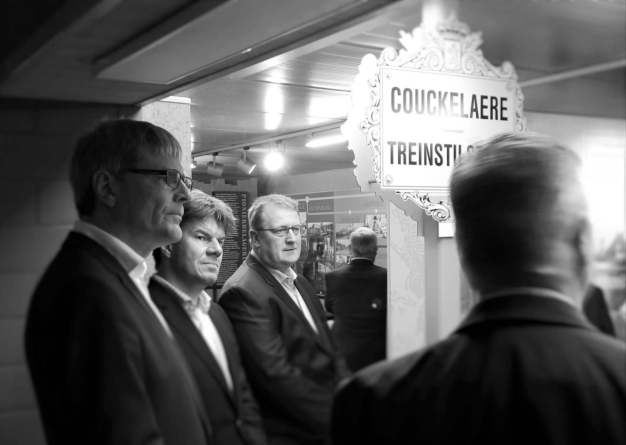 Vlaams minister van Cultuur Sven Gatz (2de v.links) op bezoek in het Lange Max Museum te Koekelare, vergezeld van Burgemeester en schepenen van Koekelare.